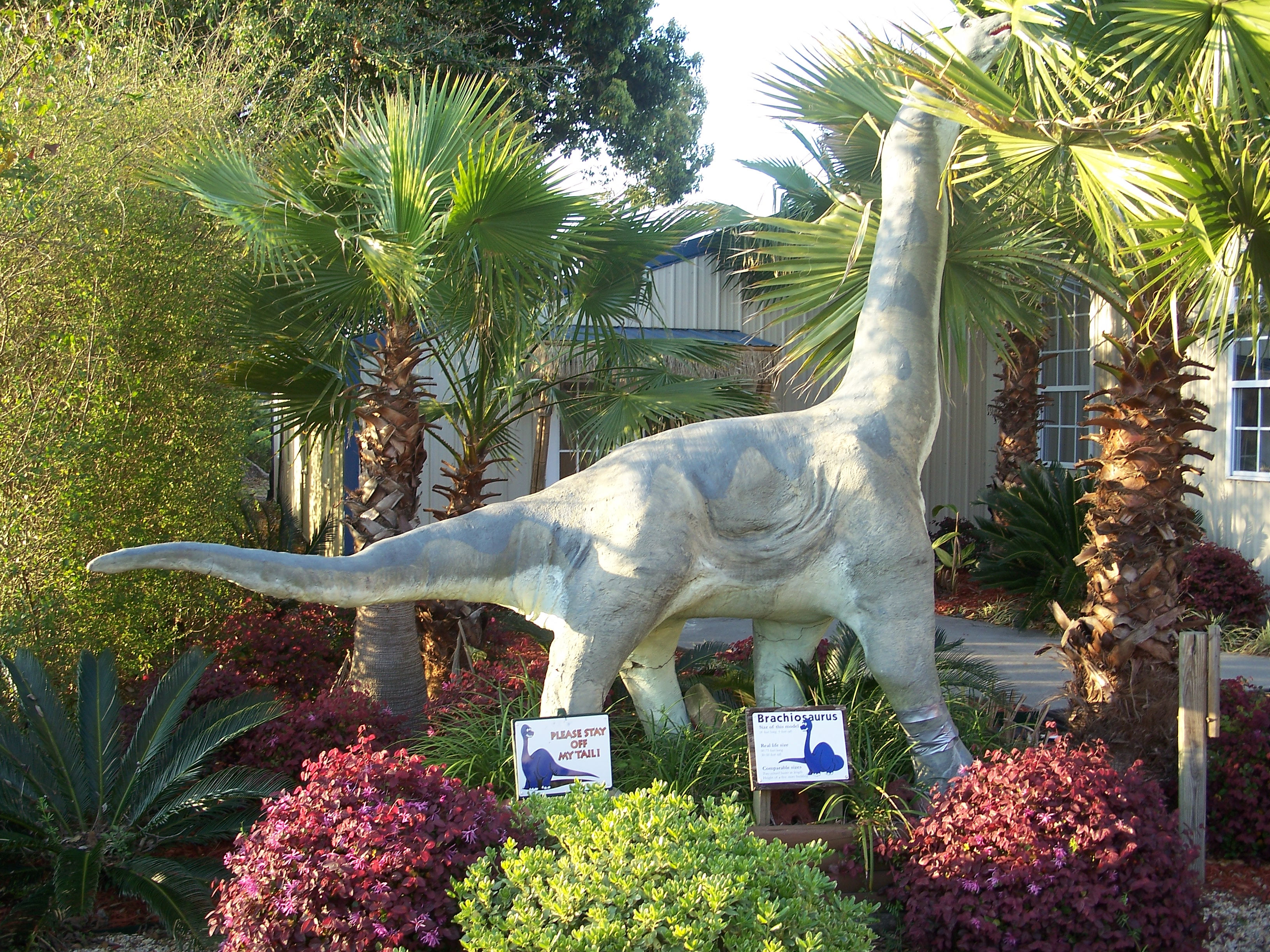 Brachiosaurus model in Dinosaur Adventure Land in Pensacola, Florida.